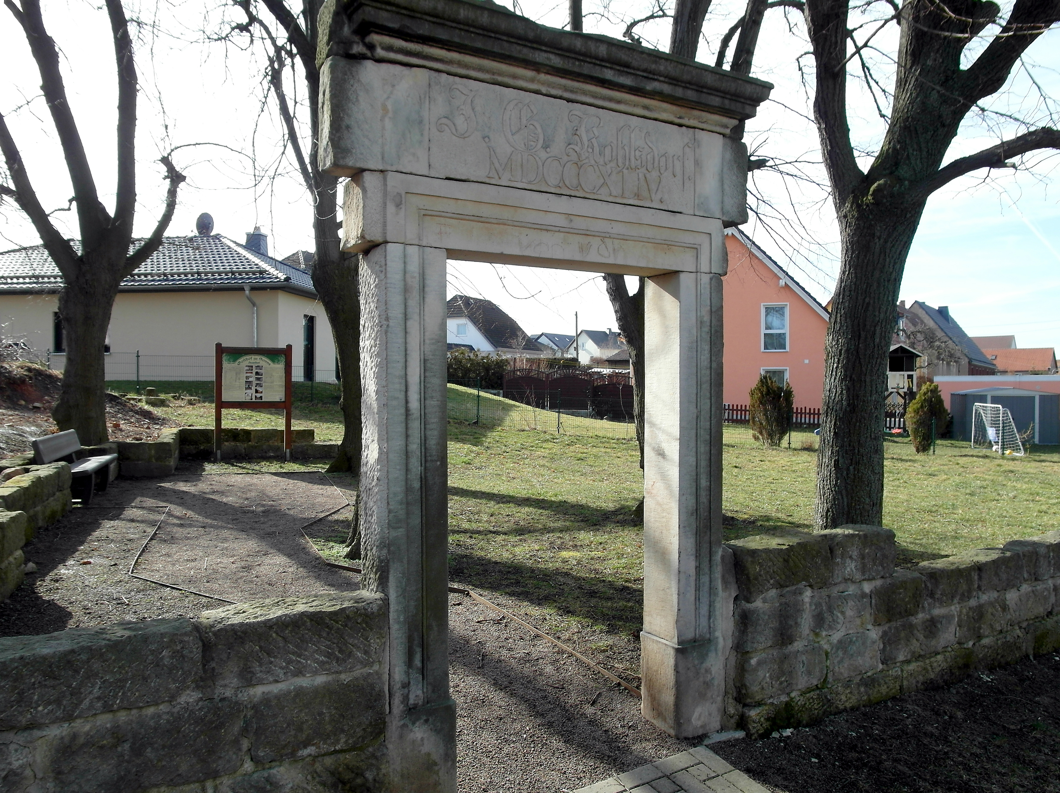 23.02.2019 01737 Braunsdorf (Wilsdruff), Platz der Jugend (GMP: 51.016458,13.573637): Hier stand bis zu seiner Verwüstung durch Vandalismus nach der Wende und seinem Abriß im August 2006 der "Gasthof zur Sonne". Der Gasthof wurde 1844 von Johann Gottlieb Kohlsdorf erbaut und 1867/68 zum Teil vom Rittergut aufgekauft. In der Folgezeit wechseln die Eigentümer und Pächter oft, aber die "Sonne" blieb ein beliebter kultureller Mittelpunkt der Dorfgemeinschaft, vor allem auch in der DDR-Zeit. 1974 wurde durch den Dorfclub Saal und Gaststätte mit in vielen freiwilligen Arbeitsstunden gründlich überholt und teils erneuert. In den Folgejahren gab es viele Veranstaltungen, deren Träger der Dorfclub war. Mit Auflösung der Konsumgenossenschaft Freital 1992 wurde der Gaststättenbetrieb eingestellt. Der damalige Jugendclub Braunsdorf führte weiterhin Veranstaltungen in eigener Regie durch. Das alles endete 1995 mit der Rückübertragung an Gerhard Mann. Es beginnt eine bewußte, von Vandalismus geprägte Zerstörung und ein allmählicher Zerfall. Im Herbst 2006 erfolgte der Abriß. Heimatfreunde habe 2009 das alte Hausportal mit der Inschrift "J. G. Kohlsdorf MDCCCXLIV", das sich ursprünlich flächenbündig in der Hauswand befand, als Erinnerungsmal hier am ehemaligen Biergarten (in Bild) aufgestellt. (Quelle: Infotafel des Orts-Chronisten Erhart Heinze - 2011) [SAM9619.JPG]20190223125DR.JPG(c)Blobelt